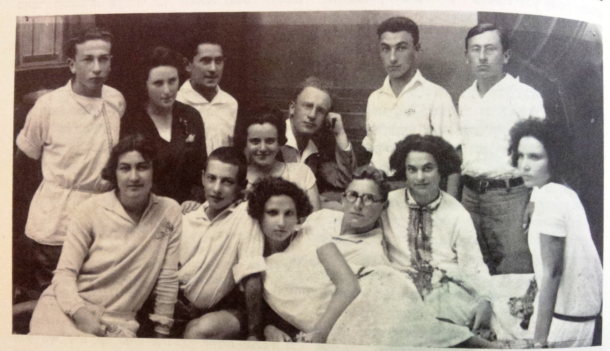 חברי "החוג הזקן"